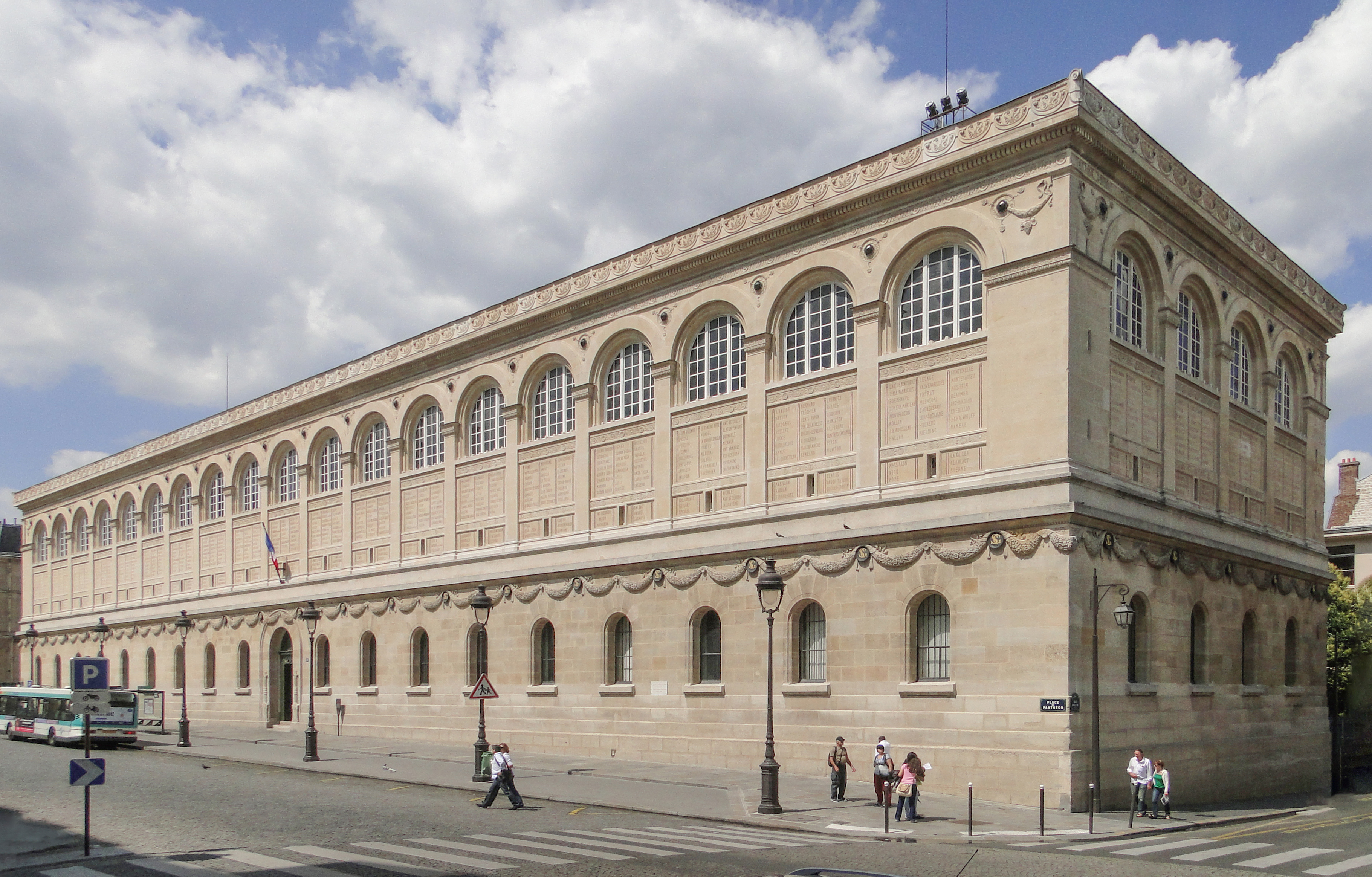 Façade Sud-Est, place du Panthéon-rueValette